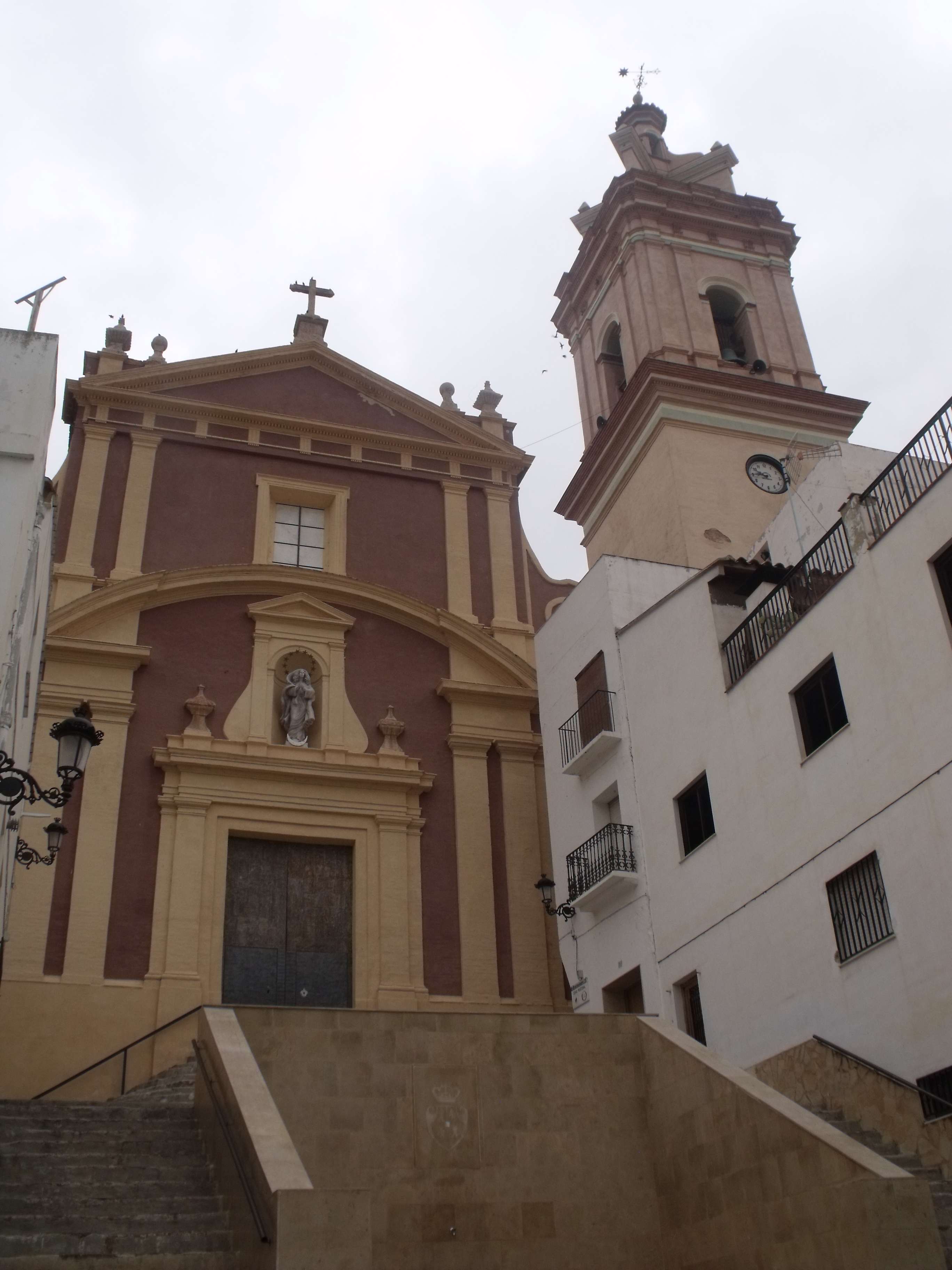 Fachada y campanario de la iglesia de la Purísima Concepción